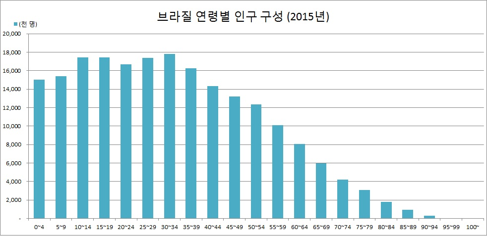 한국어 (조선): 브라질 연령별 인구 구성(2015년 UN 통계자료를 바탕으로 제작)